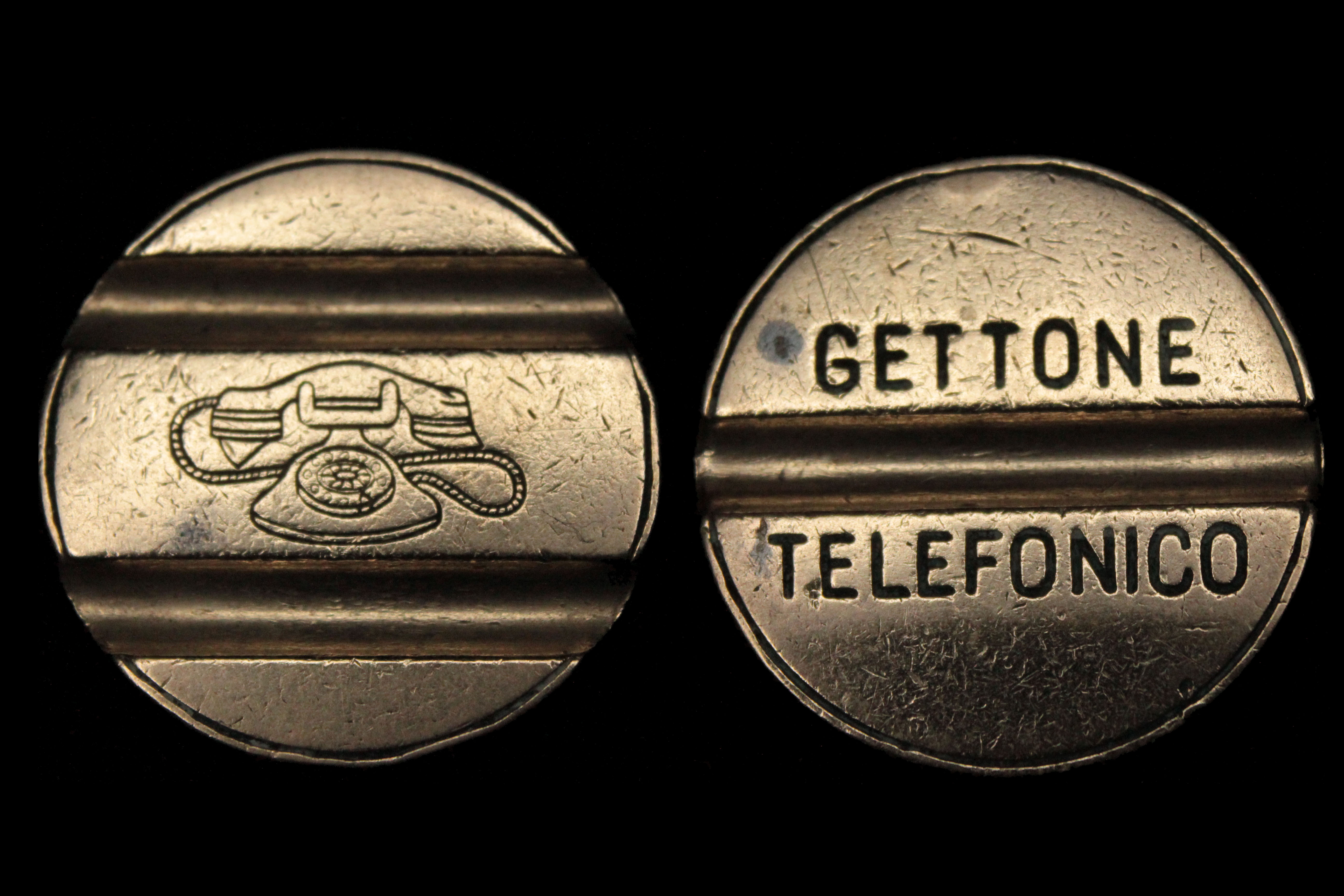 Gettone telefonico per cabina telefonica SIP - TelecomItalia usato fino al 2001